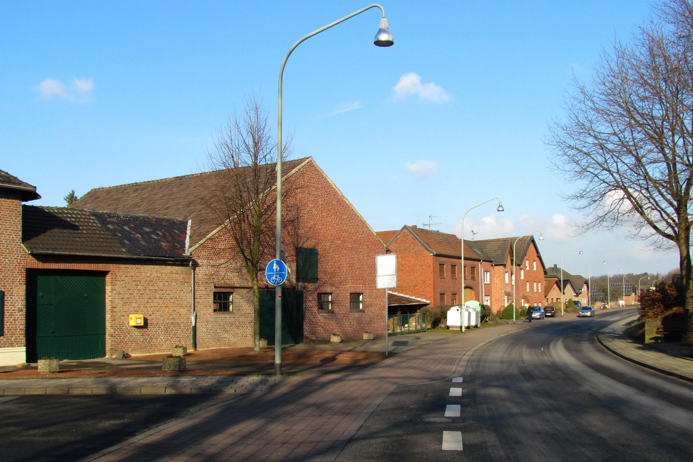 Ortsbebauung in Nierstraß